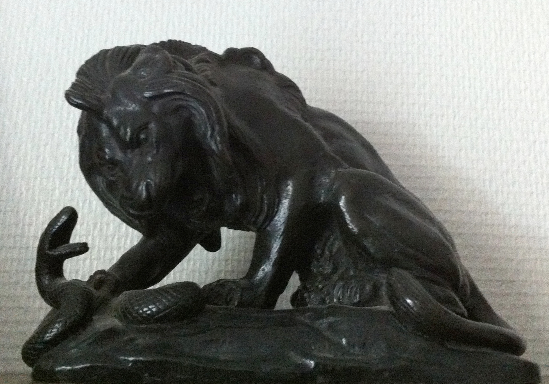 Sculpture en bronze, 15x20x10 cm, signé V. Chemin au dos de la terrasse, id est, Joseph Victor Chemin, 1825 (?)-1901, représentant un lion rugissant accroupi aux prises avec un serpent gueule ouverte lui faisant face.